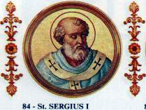 Pope Sergius I